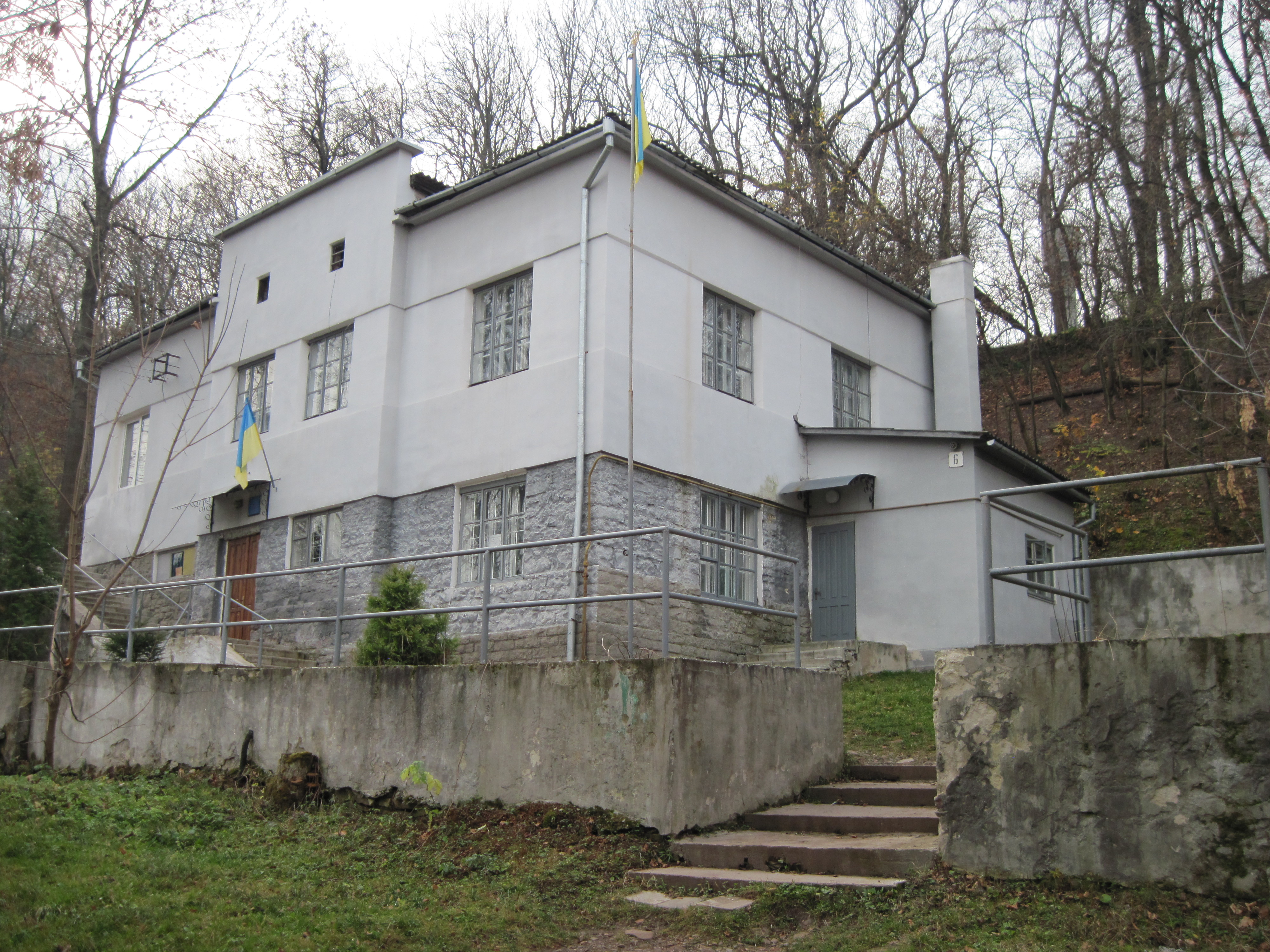 Будинок Центру дитячої та юнацької творчості «Сузір'я» (колишня станція юних техніків), Бучач, осінь 2013